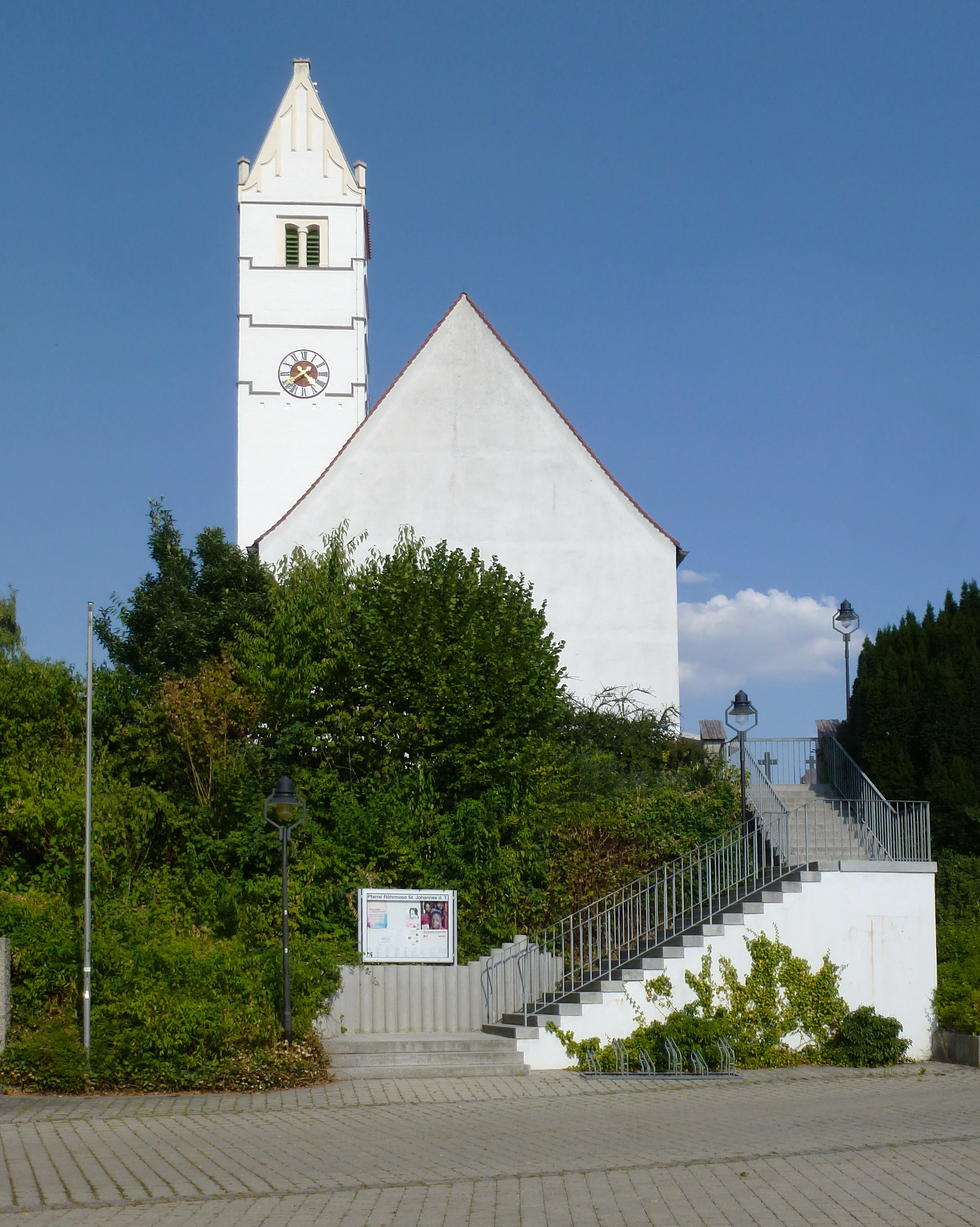 Röhrmoos, Am Kirchplatz 10: Katholische Pfarrkirche St. Johannes der Täufer. Aufnahme von W